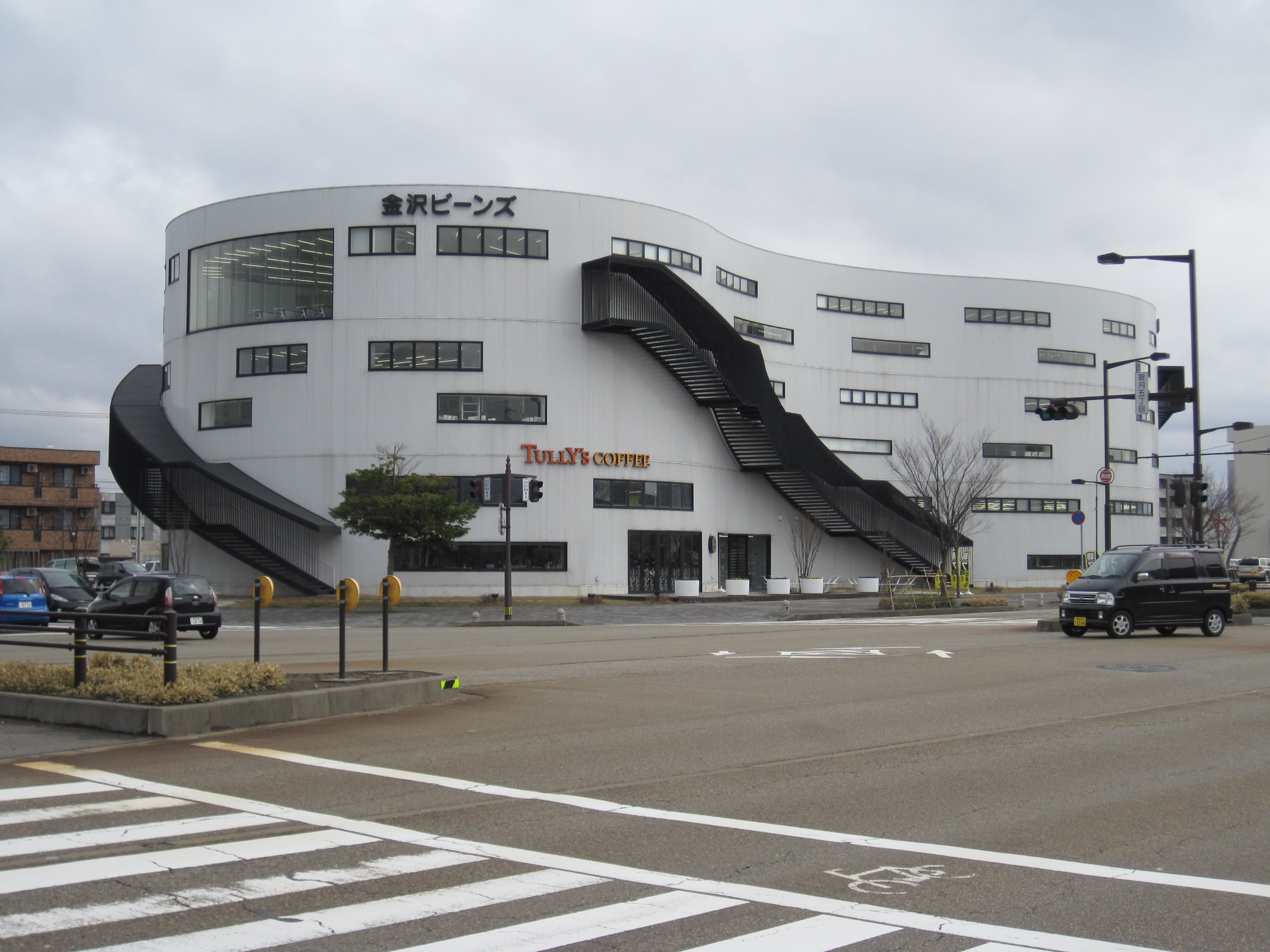 金沢ビーンズ（石川県金沢市）